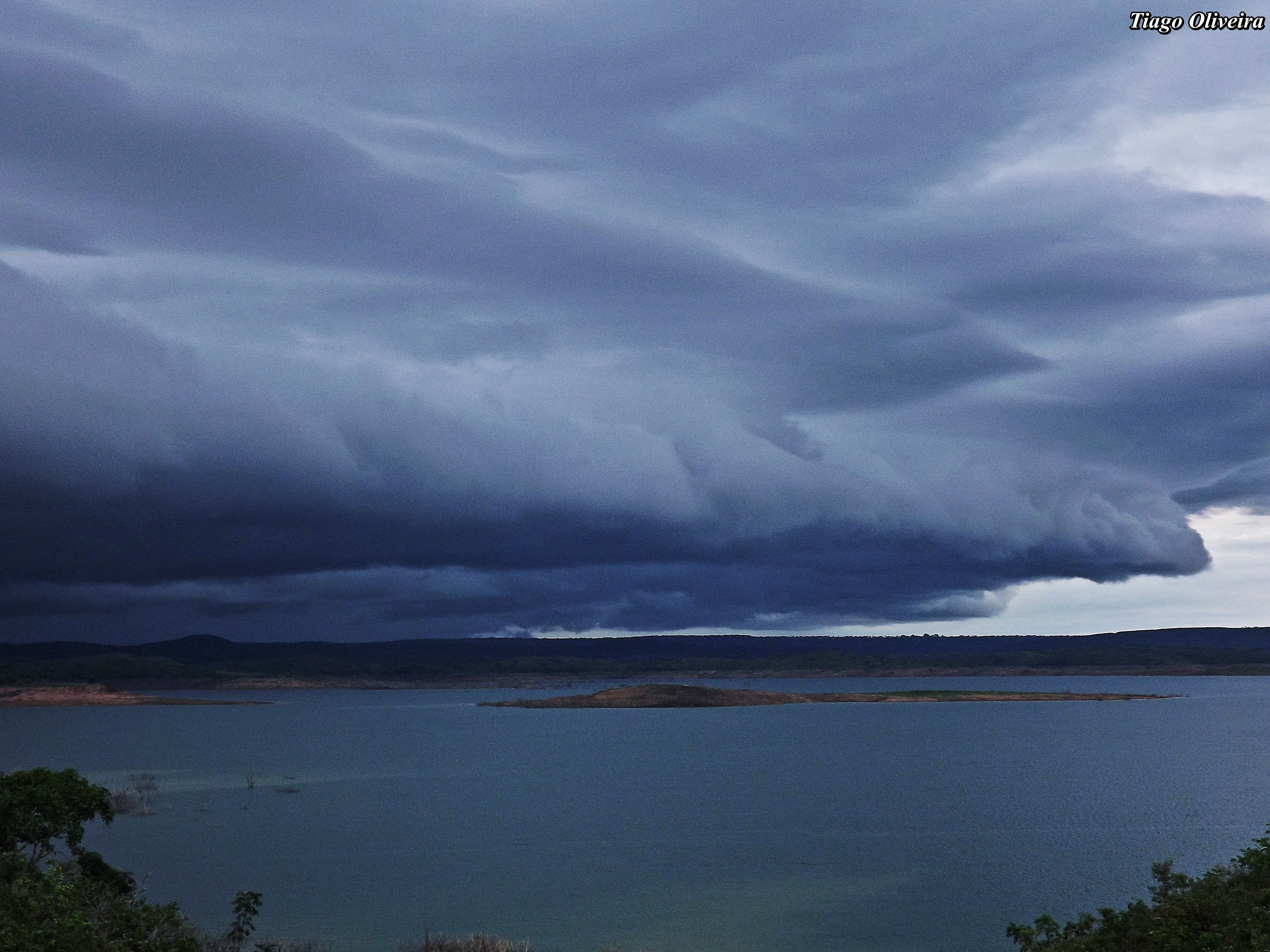 Tempestade vista do alto da Serra do Facão - Catalão GO.